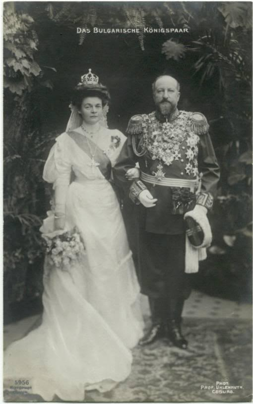 Hochzeitsbild von Zar Ferdinand I. von Bulgarien und seiner zweiten Frau Eleonore Reuß zu Köstritz